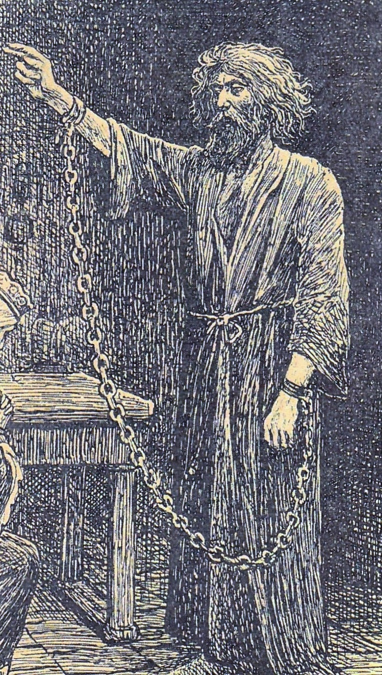 Biskop Valdemar (Valdemar Knudsen) som tegnet af Poul Steffensen i 1913 - gengiver tidpunktet lige før hans frigivelse fra fangenskabet på Søborg Slot i 1206.